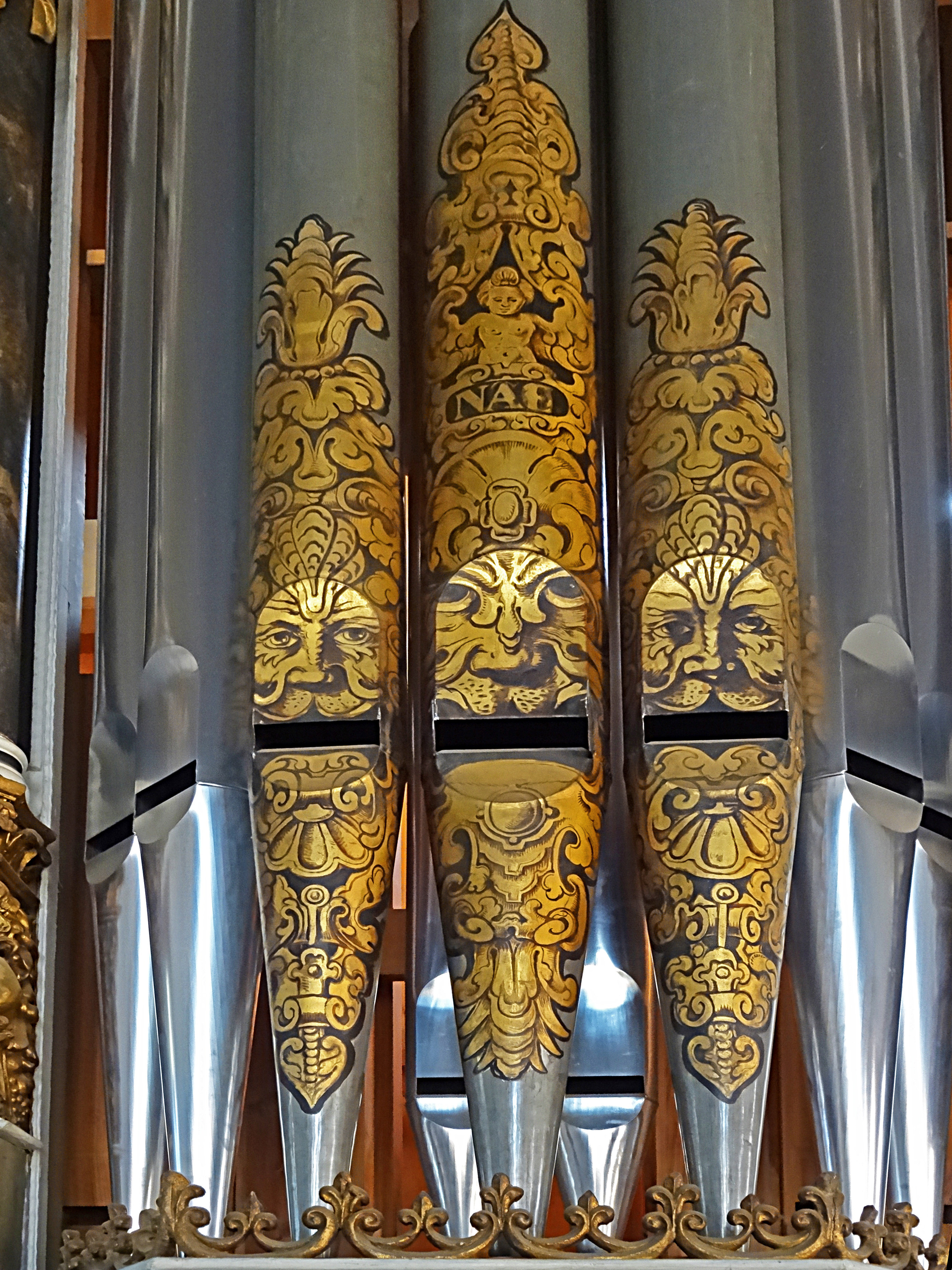 Details der Orgel in der Michaeliskirche Erfurt, einem Orgelneubau (1896 Friedrich Petersilie und 2000 W. Rühle & Sohn) im Gehäuse von Ludwig Compenius (1652).